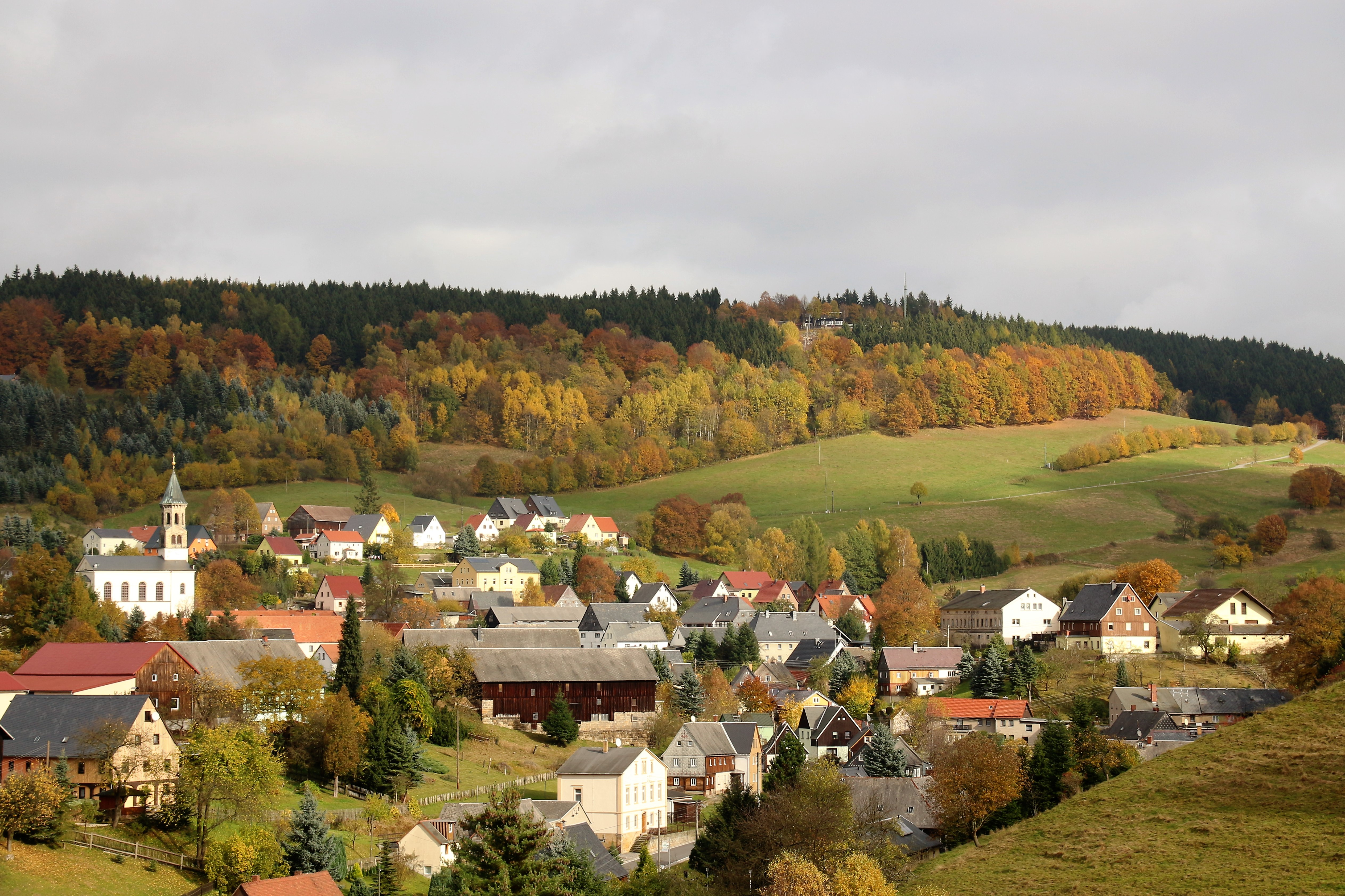 Blick zum Wachberg